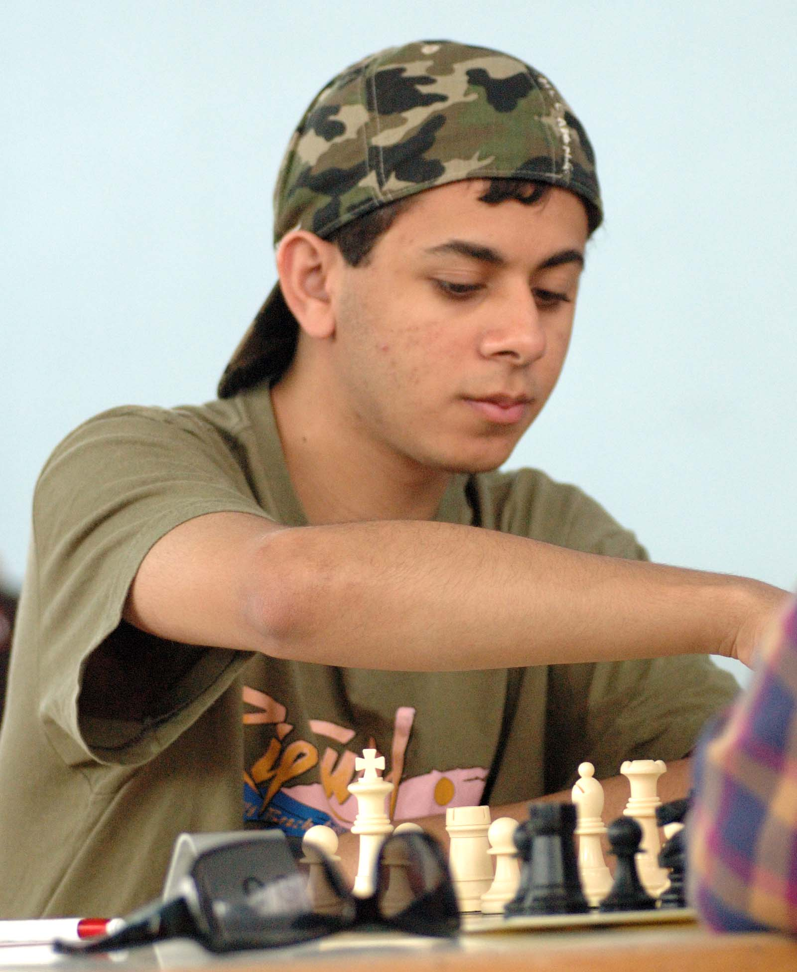 El Maestro Internacional brasileño André Diamant durante la primera ronda del XXI Open Internacional de Ajedrez de Moratalaz (Madrid).